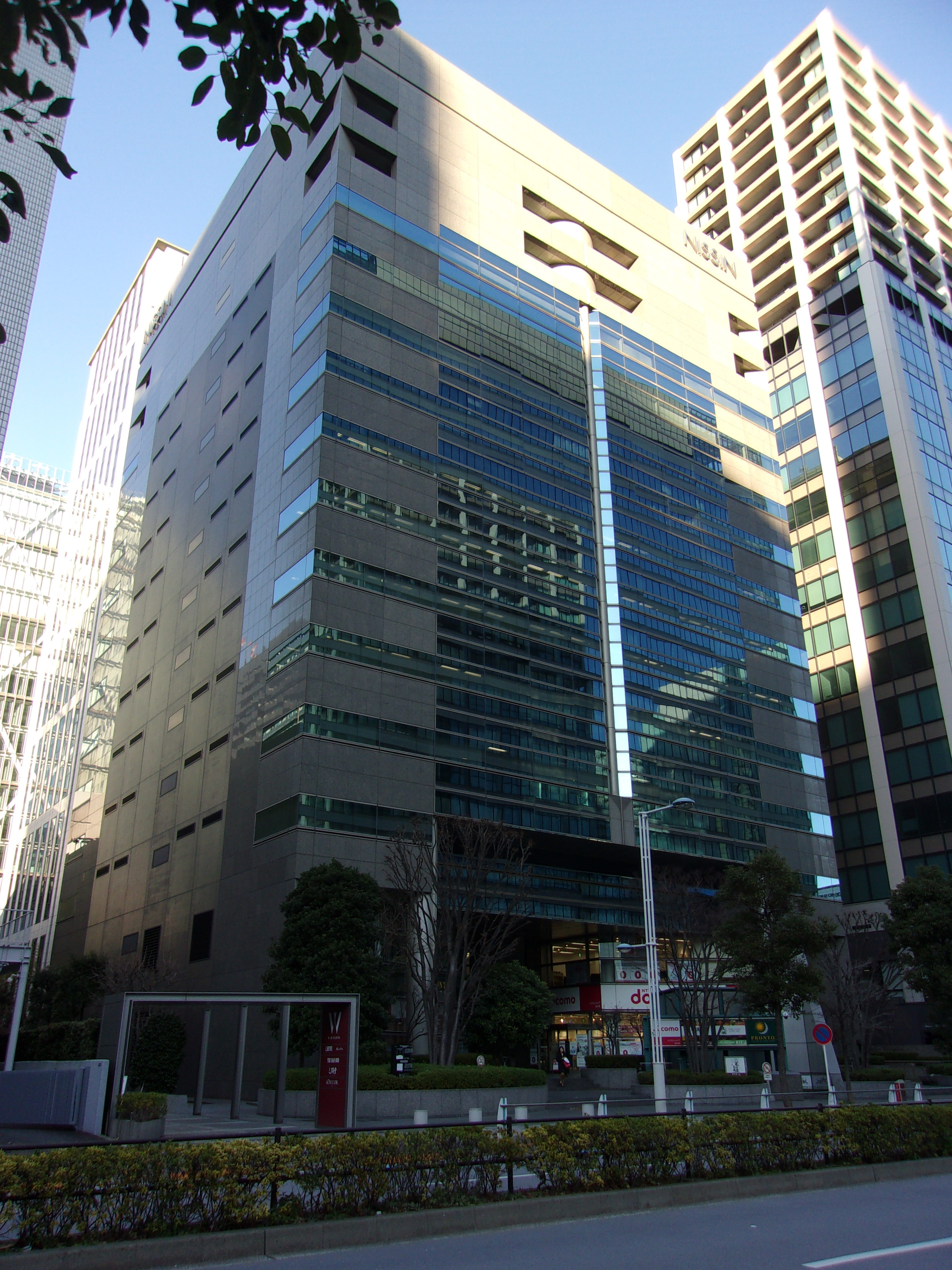 JR東海不動産本社が入居する日新ビル